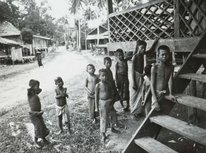 Foto. Een groep kinderen in het dorp Babat